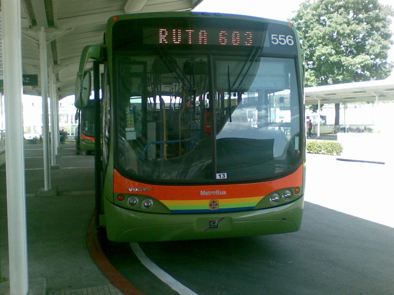 Unidad del Sistema Metrobús del Metro de Caracas